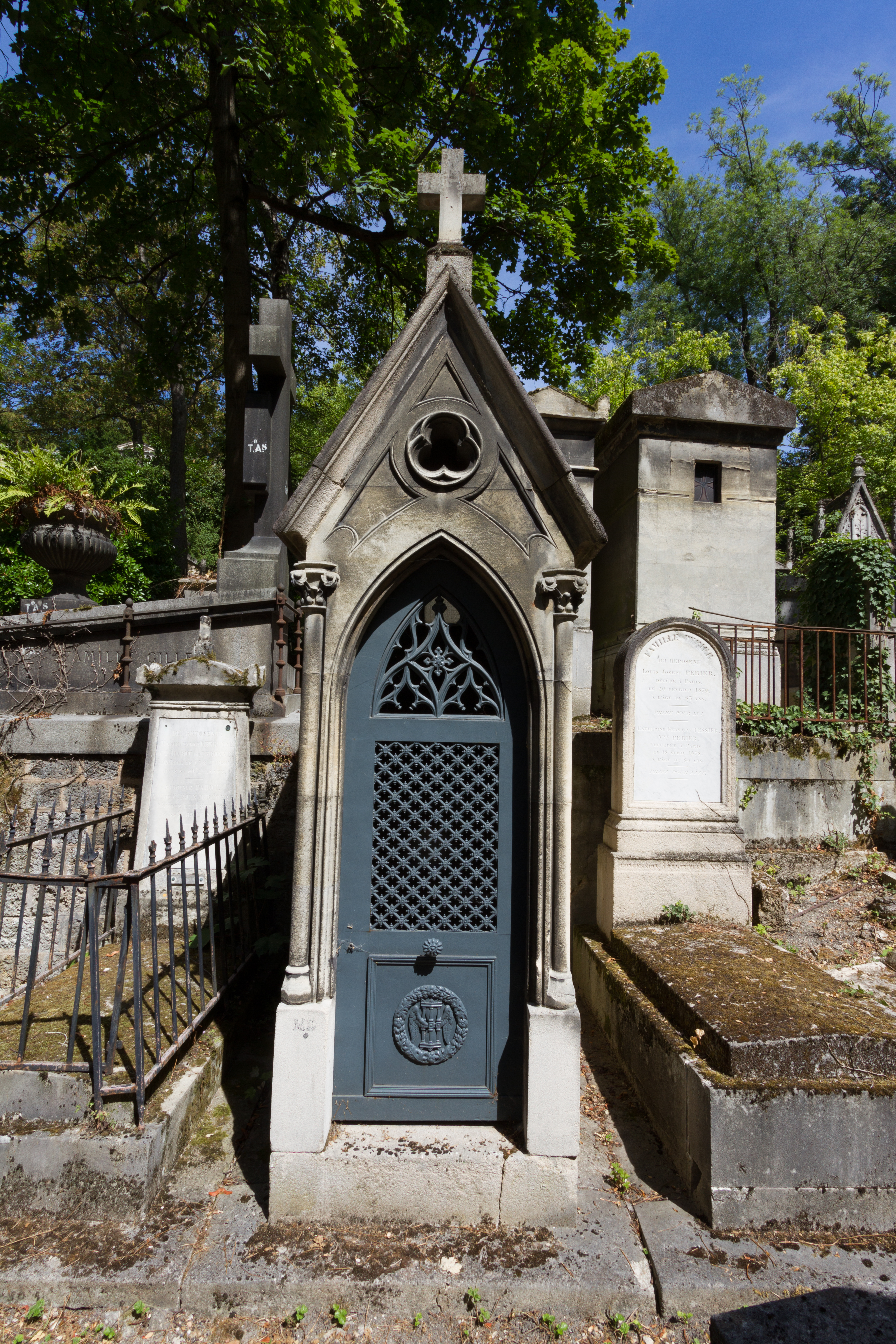 Sépulture d'Auguste Edmond Petit de Beauverger (1818-1873), député.